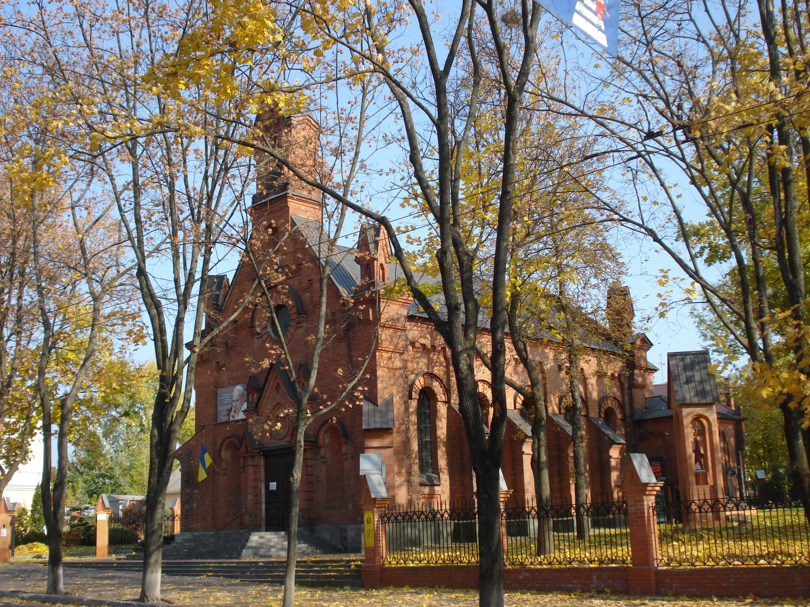 Костел, Суми, вул. Троїцька, 6